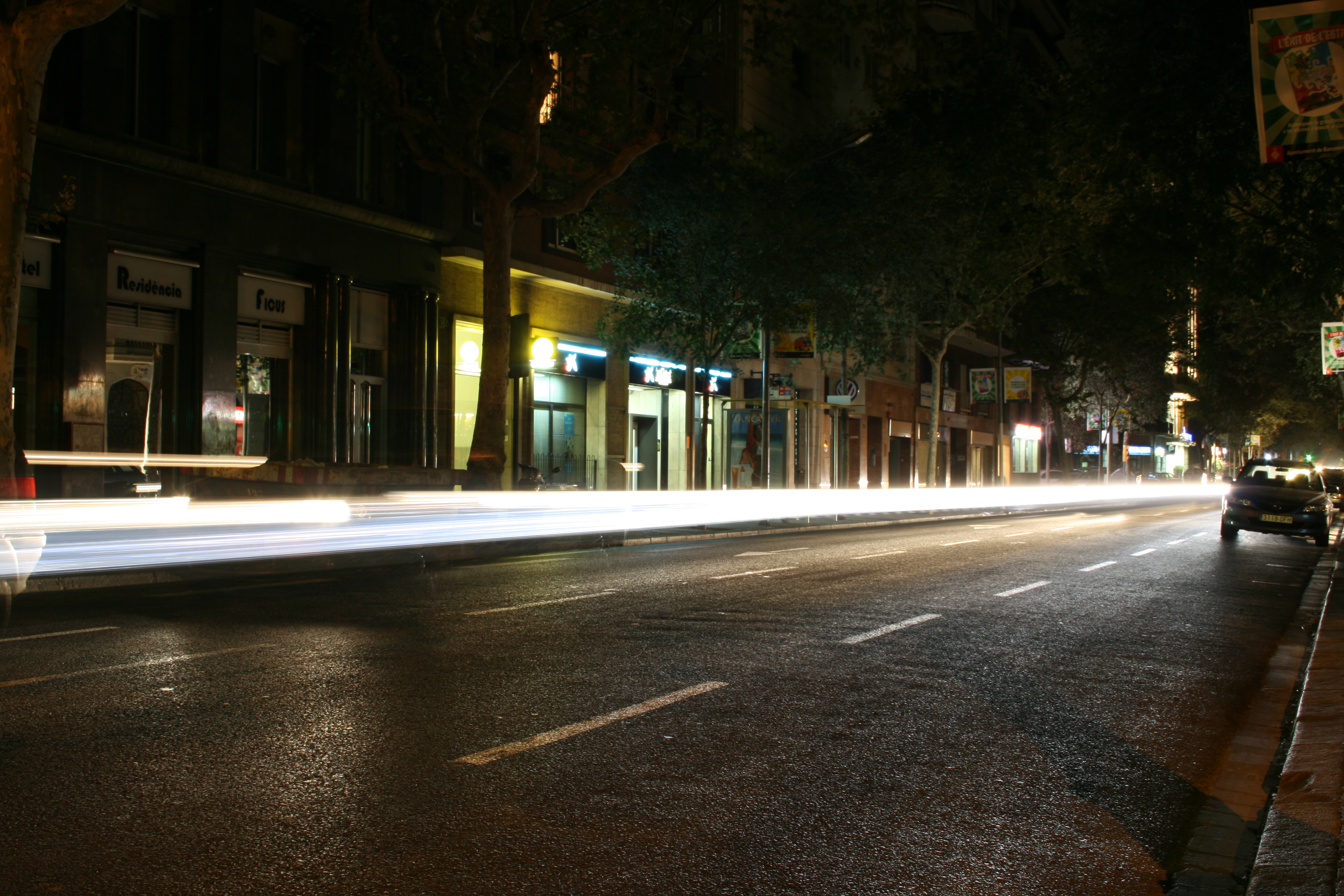 Carrer Mallorca @ Barcelona